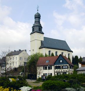 Pfarrkirche St. Margaretha Hasselbach